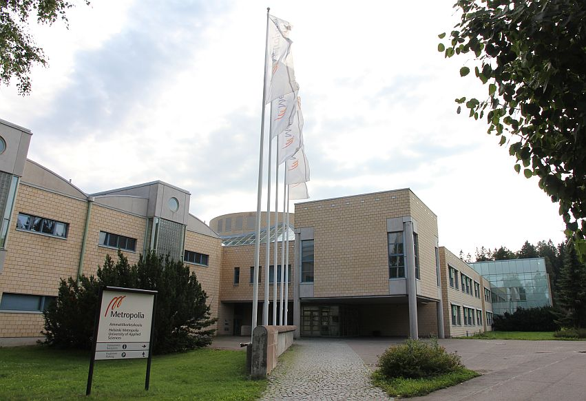 Metropolia ammattikorkeakoulun Vantaan Myyrmäen toimipiste. Huom: Muista säilyttää viittaus kuvaajaan, mikäli käytät kuvaa.